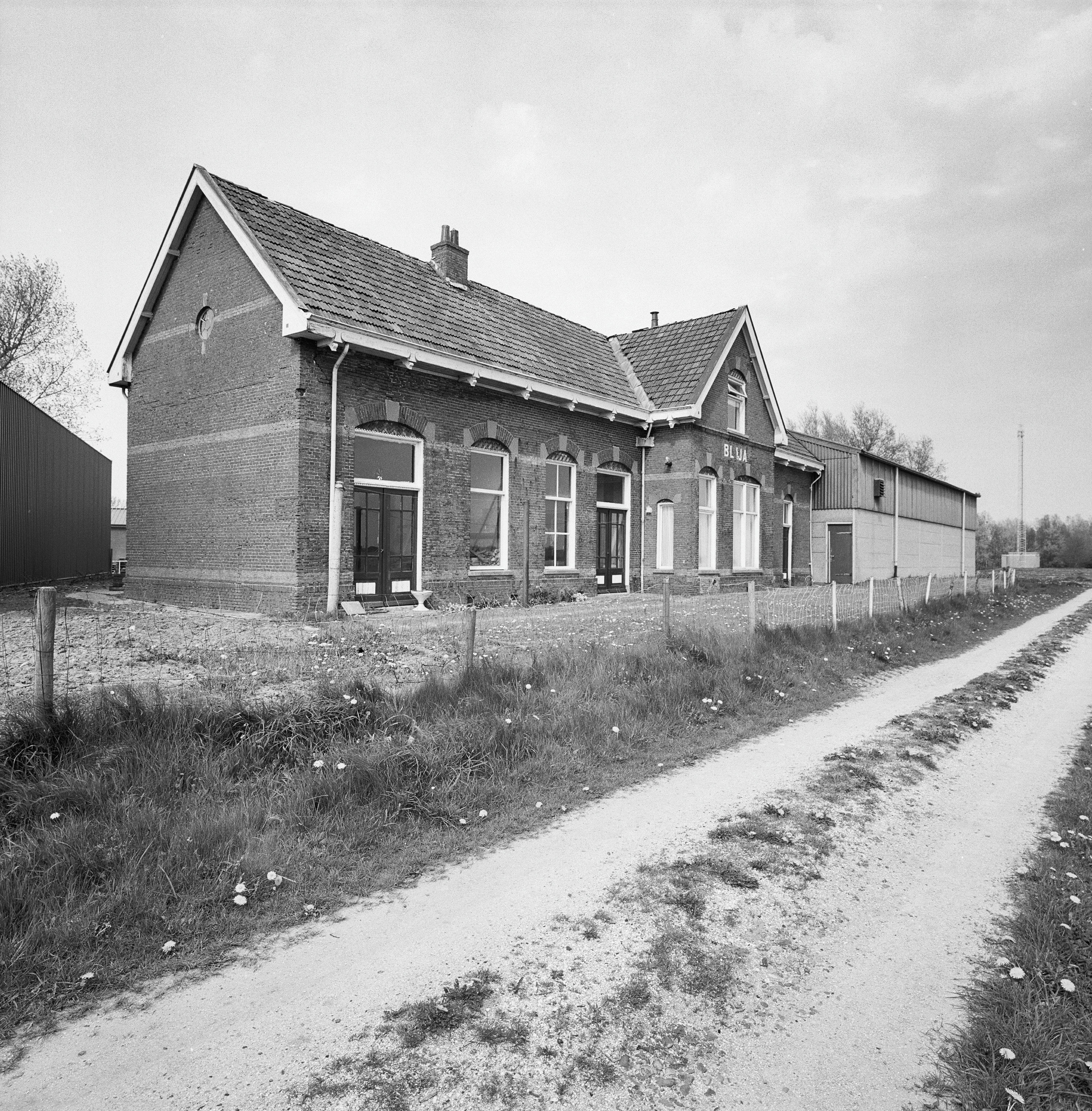 Station Noord-Friesche Locaalspoorweg-Maatschappij: Overzicht voorgevel en linker zijgevel, voormalig station (opmerking: Gefotografeerd voor Monumenten In Nederland Friesland, bladzijde 85)